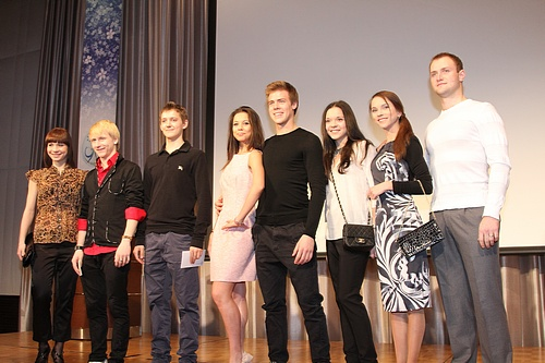 Команда России на командном чемпионате мира по фигурному катанию 2012. Слева на право: Алёна Леонова, Жан Буш, Максим Ковтун, Елена Ильиных, Никита Кацалапов, Аделина Сотникова, Вера Базарова, Юрий Ларионов.